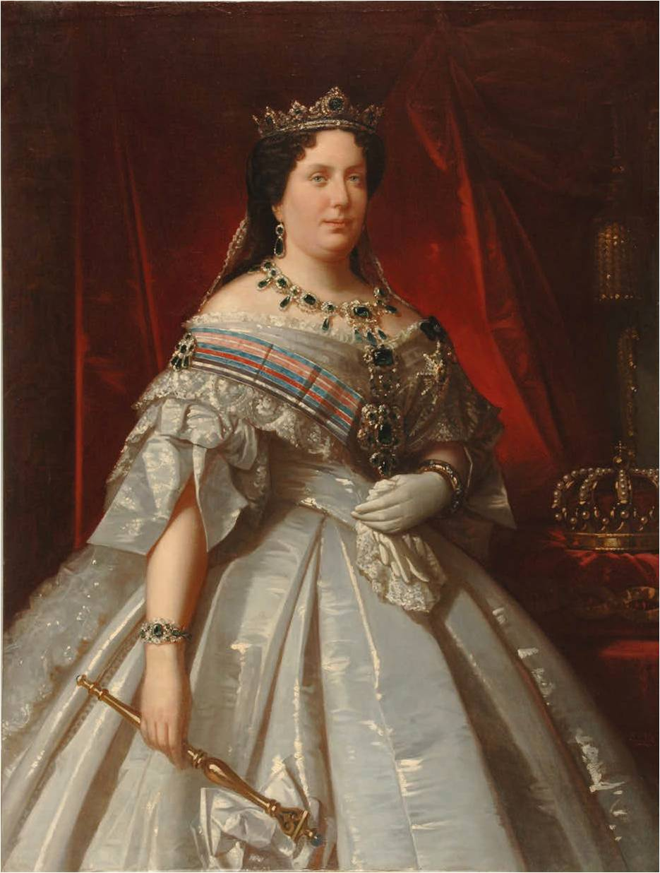 Retrato de la reina Isabel II de España (1830-1904), que era hija del rey Fernando VII de España y de la reina María Cristina de Borbón-Dos Sicilias.